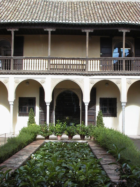 Patio de la EEA